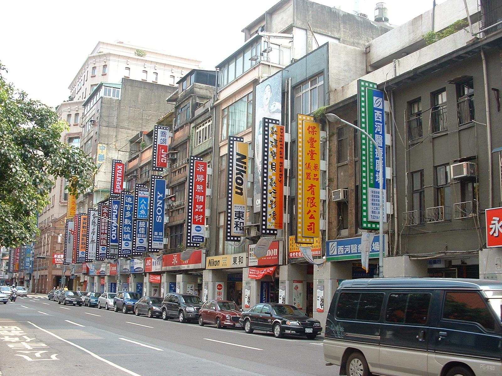 中文（台灣）: 臺北市中正區博愛路街景。